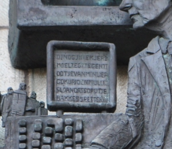 Detail uit "Ontstaan van het schrift" van May Claerhout, ingang Algemeen Rijksarchief te Brussel